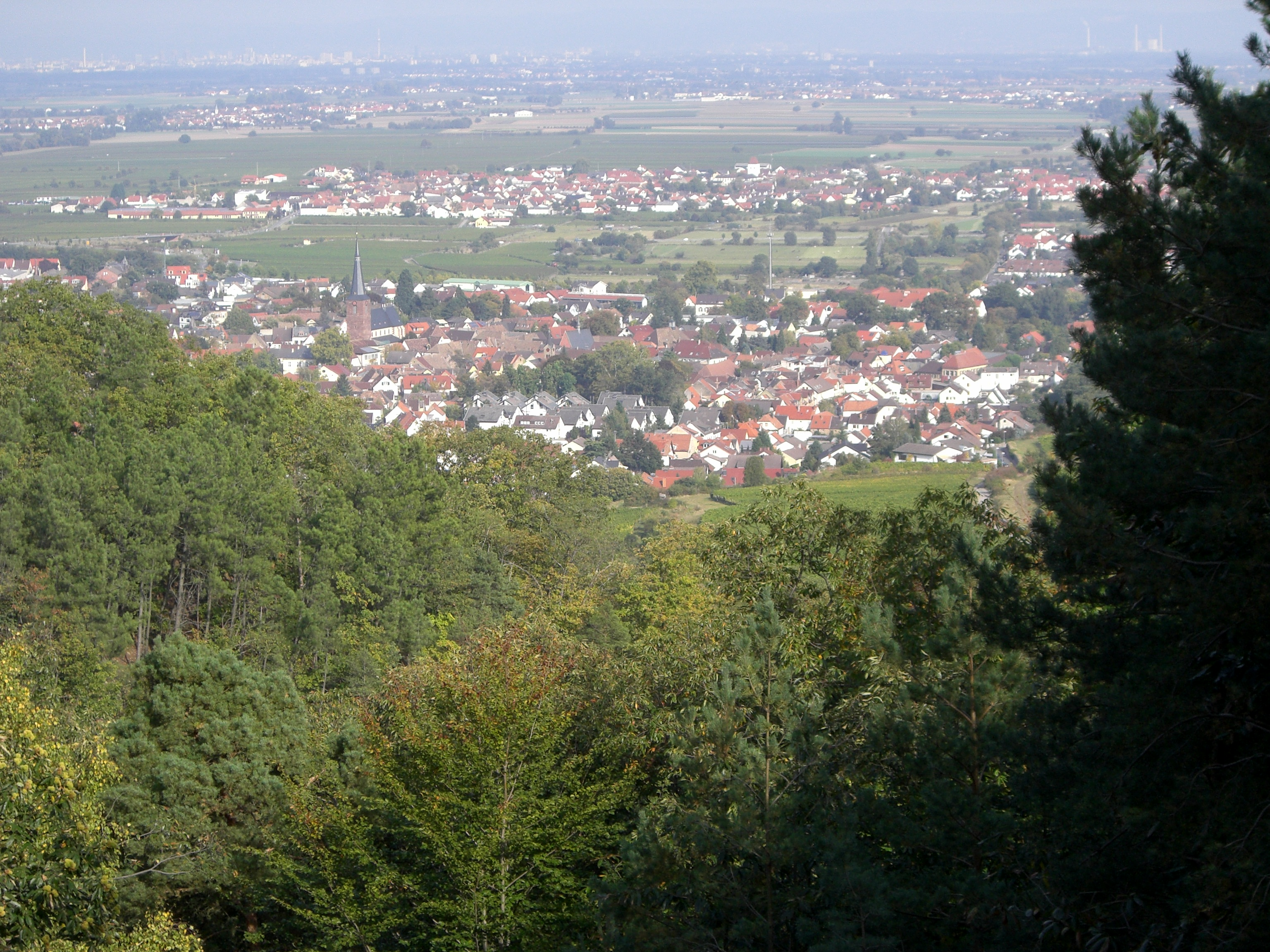 Deidesheim von Westen, dem Pfälzerwald gesehen